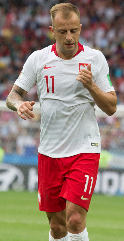 Польша неожиданно проиграла Сенегалу